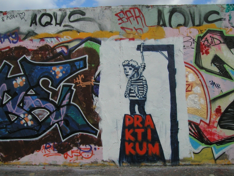 Graffiti „Praktikum“ im Berliner Mauerpark. Entstanden in Zusammenhang mit einem Filmprojekt.